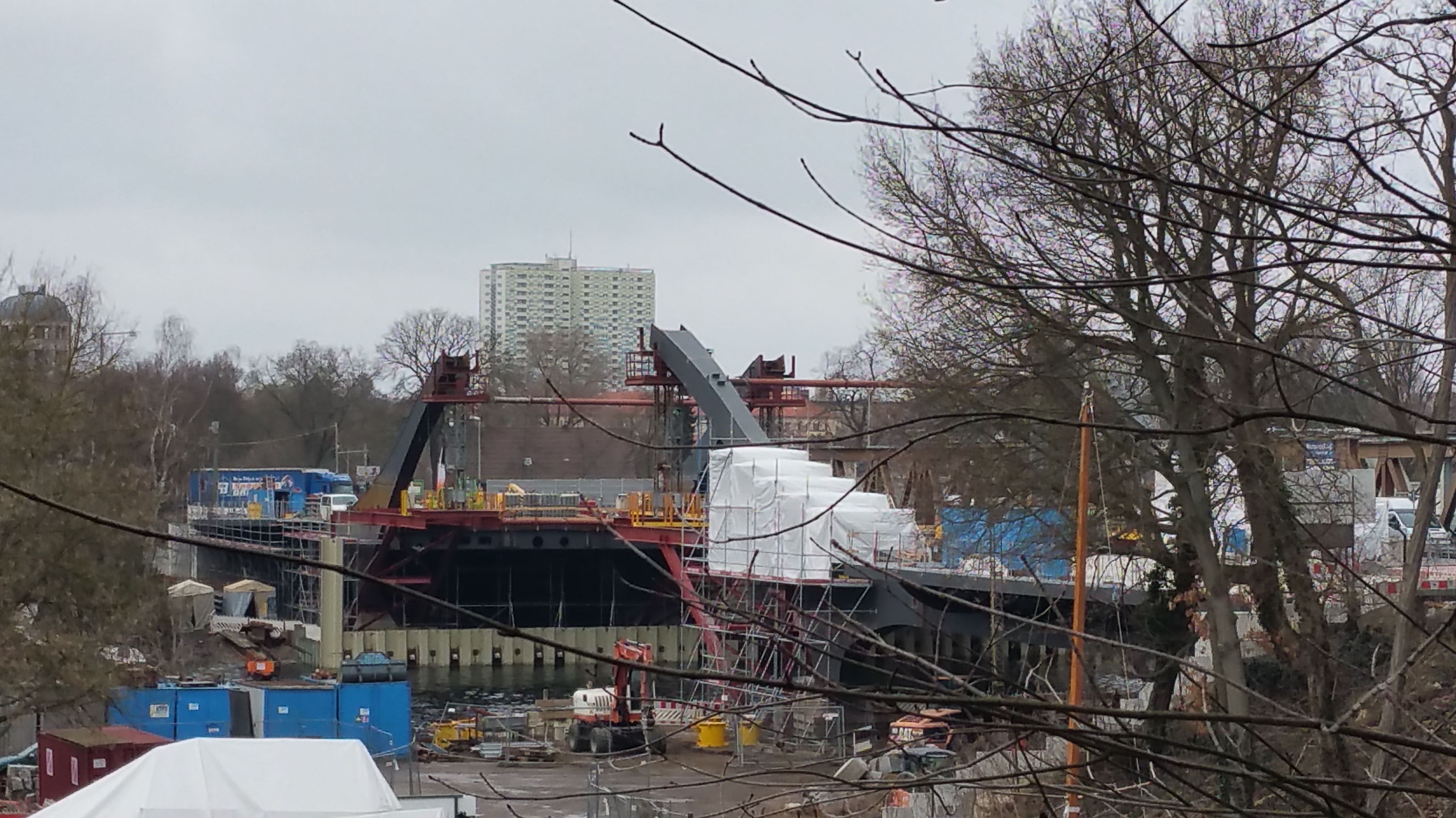 Bau der neuen Freybrücke Berlin Spandau, Heerstraße. Errichtung der Bögen